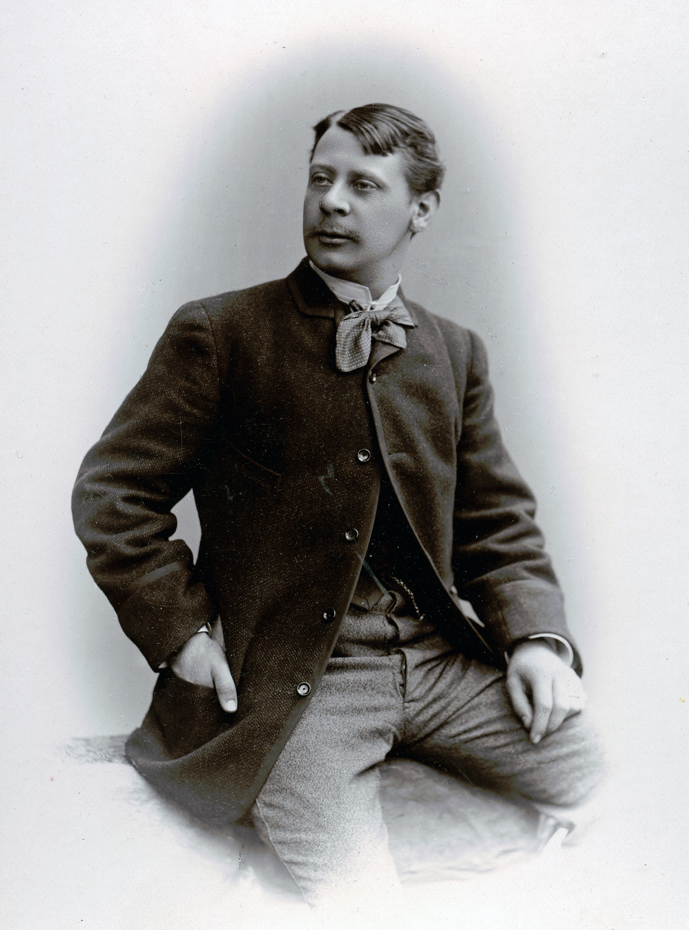 Jean Sandberg, skådespelare vid Stora teatern i Göteborg 1884